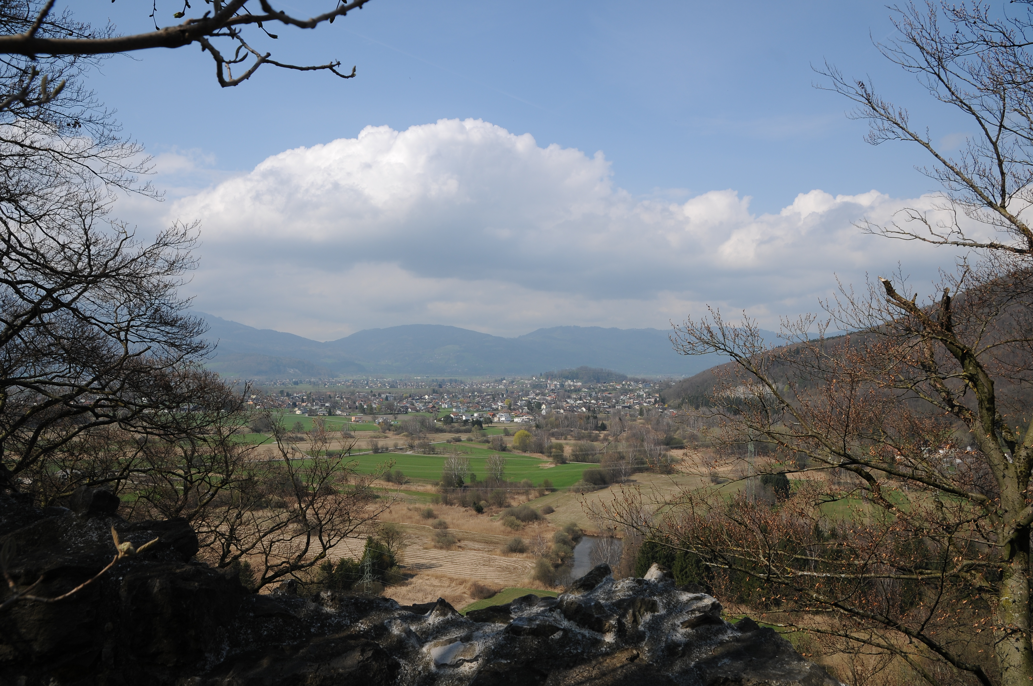 Koblach liegt im westlichsten Bundesland Österreichs, Vorarlberg, im Bezirk Feldkich auf 456 Metern Höhe. Ortsteile der Gemeinde sind: Au, Dürne, Straßenhäuser, Neuburg, Udelberg. Gesehen von der Burgruine Neuburg (Koblach).